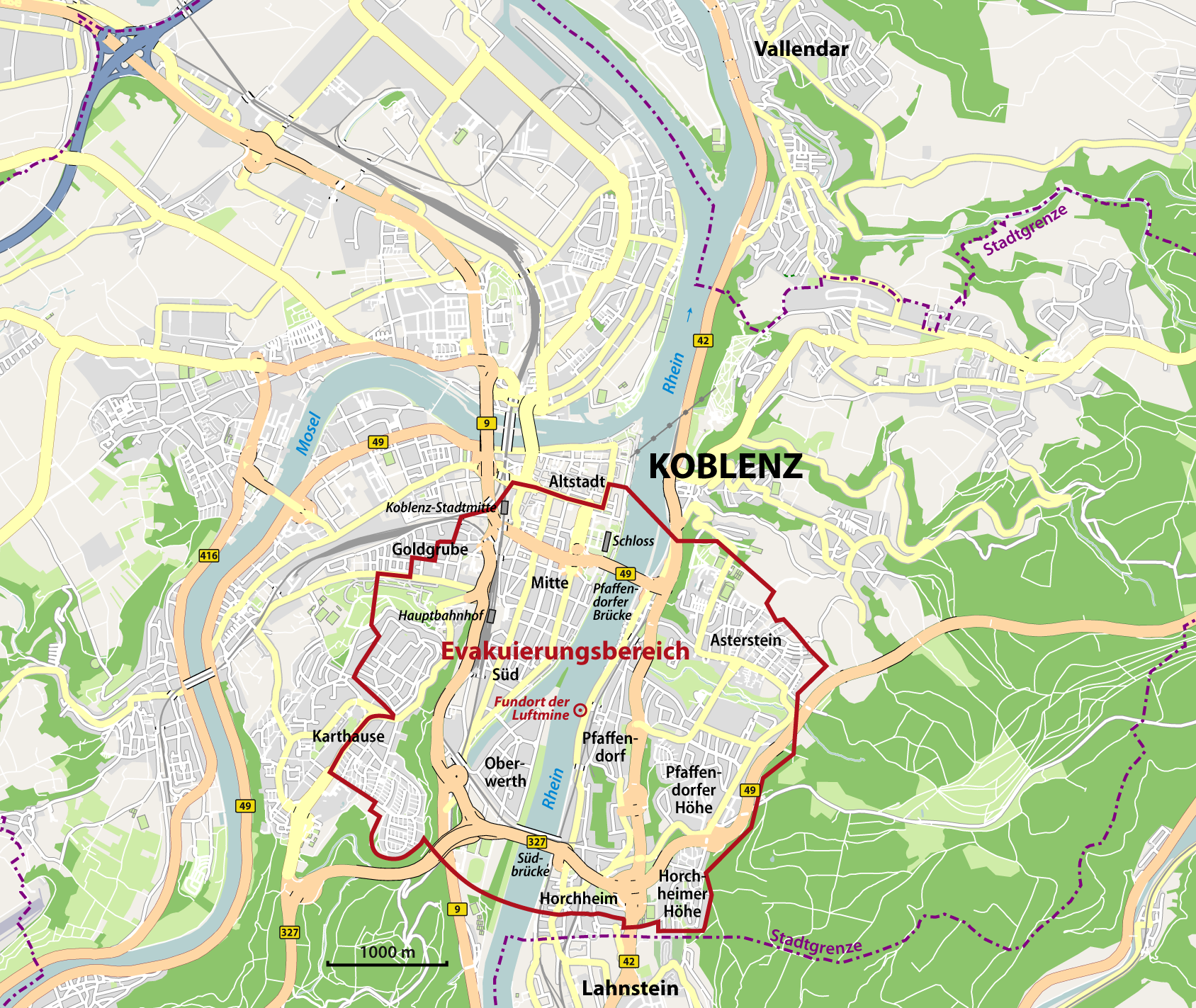 Evakuierung in Koblenz am 4. Dezember 2011: Evakuierungsbereich in Koblenz zur Entschärfung von Fliegerbomben This map may be incomplete, and may contain errors. Don't rely solely on it for navigation.